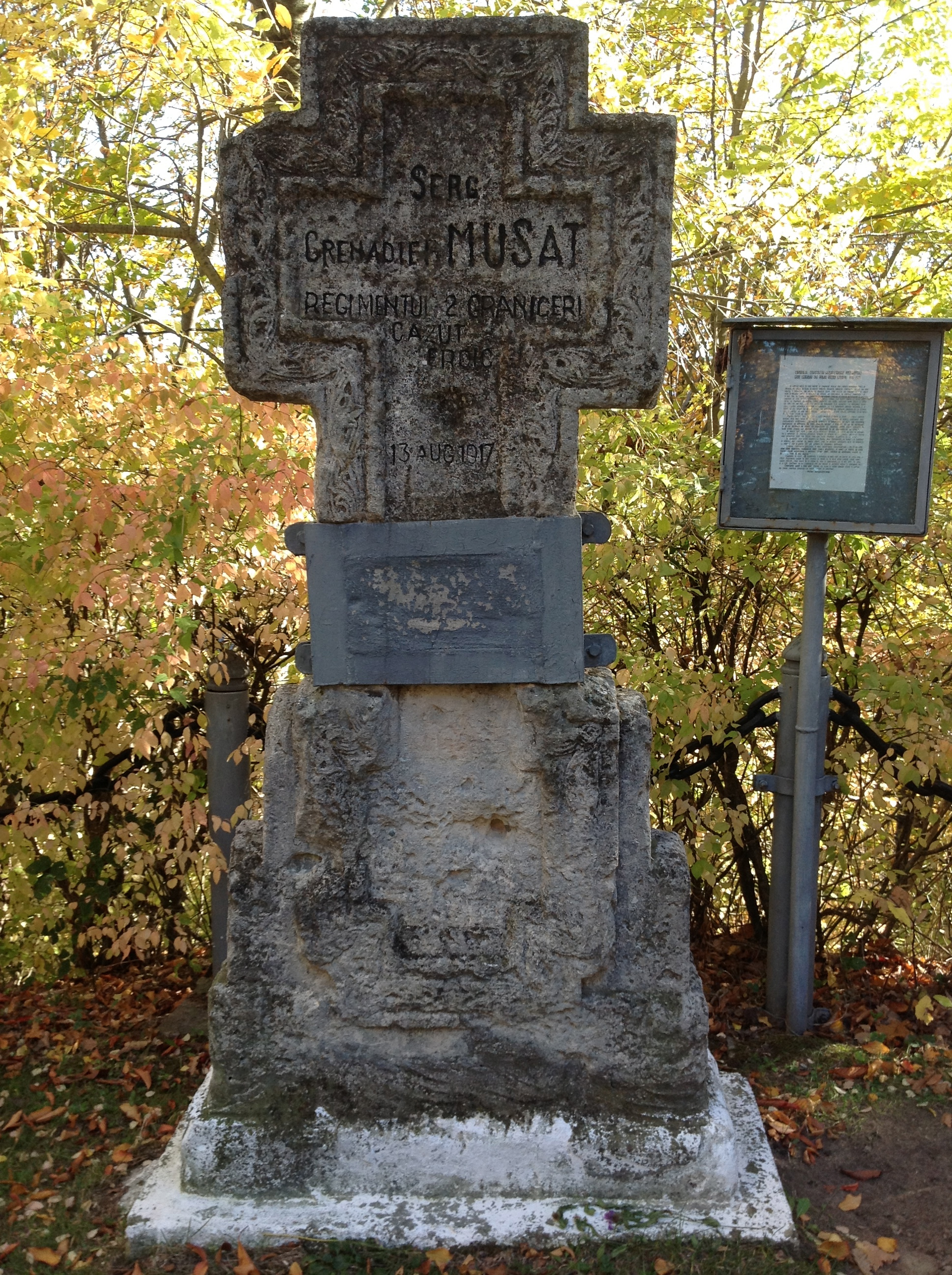 Cruce comemorativă a Sergentului Grenadier Mușat pe Dealul Măgurii de la Târgu Ocna, Bacău